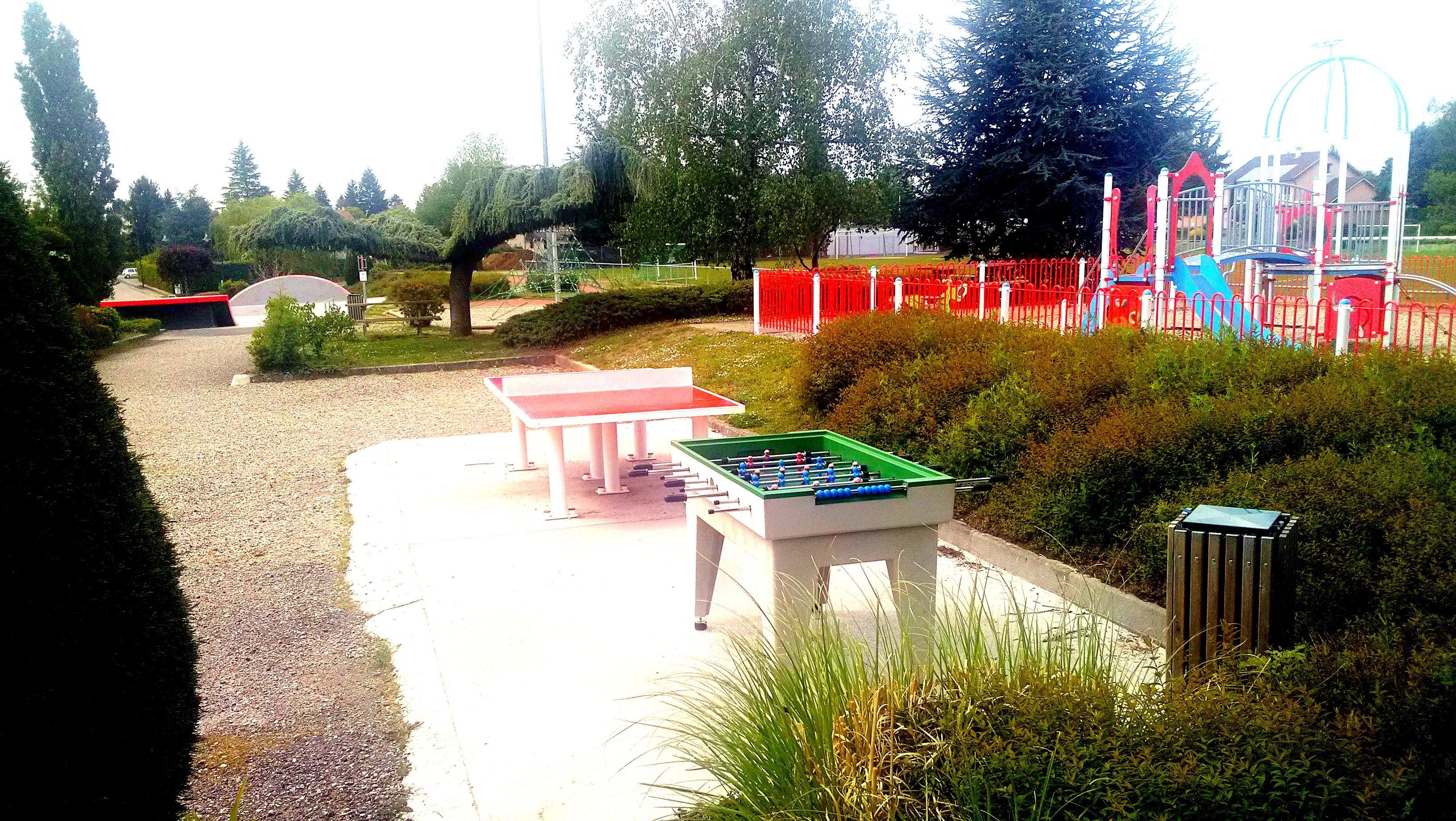 espace enfants